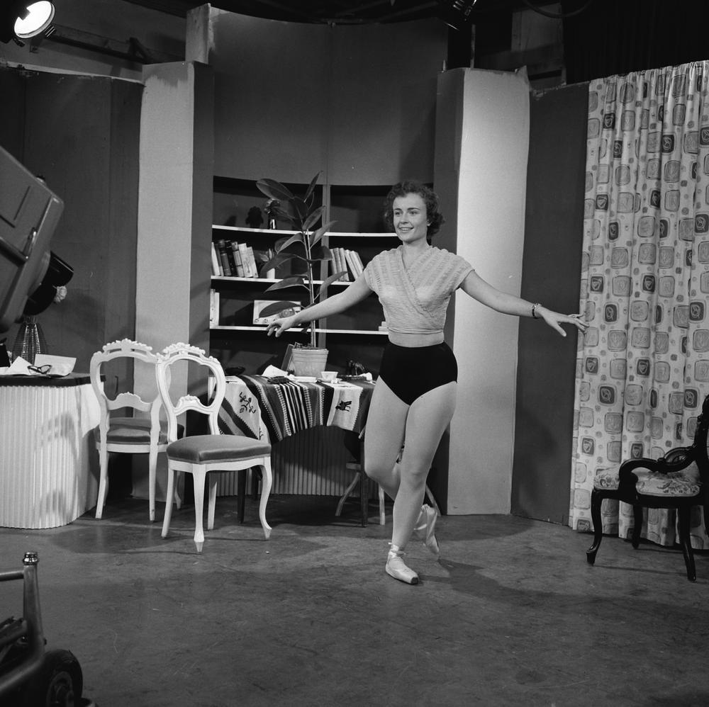 Kitty Knappert in het programma Televitrine in 1959.